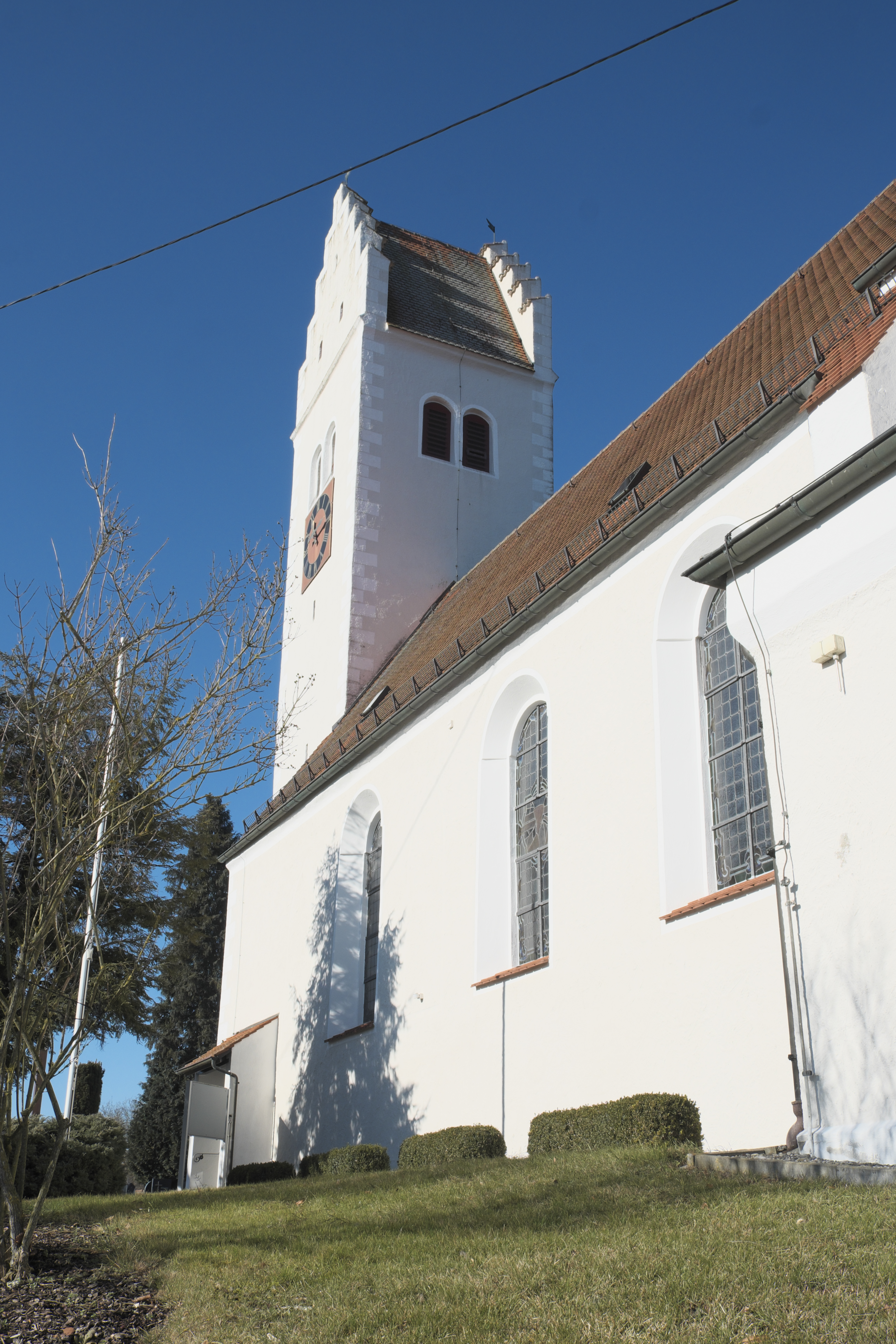 Katholische Pfarrkirche St. Georg in Hailtingen (Dürmentingen) im Landkreis Biberach (Baden-Württemberg/Deutschland)